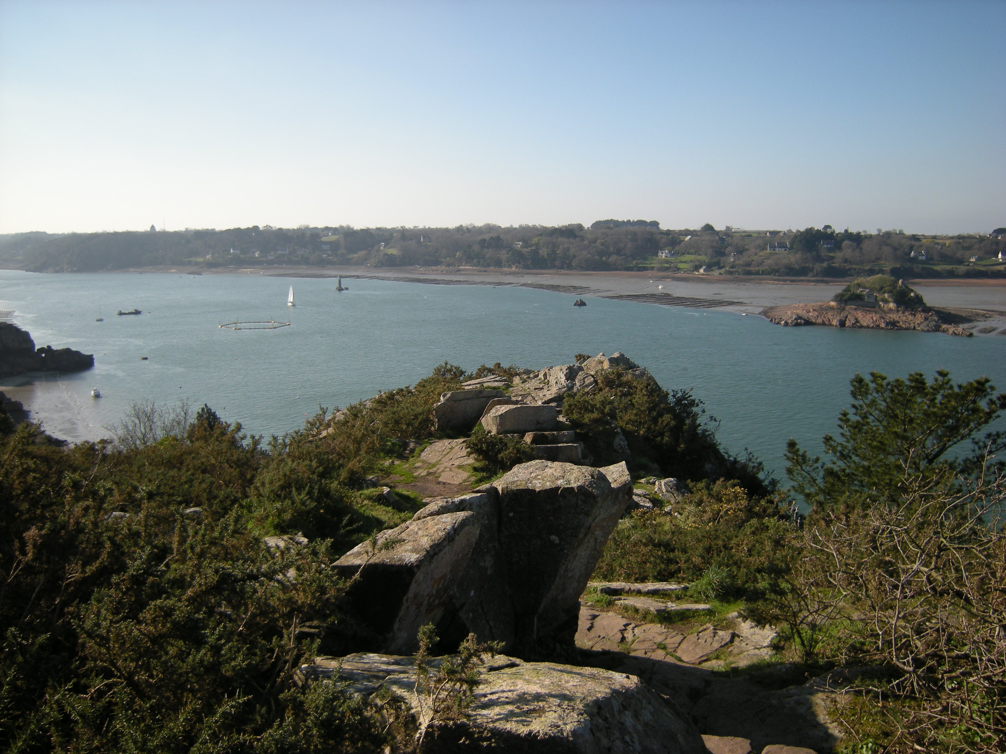 Vue vers le sud-ouest du promontoire préhistorique barré de Roch'an Evned au bord du Trieux, et sur Lézardrieux en arrière-plan. Sur la droite de la photo, en bordure d'estran du Trieux, le Roc'h ar Hon. Sur la ligne d'horizon vers la gauche, le phare de Bodic.